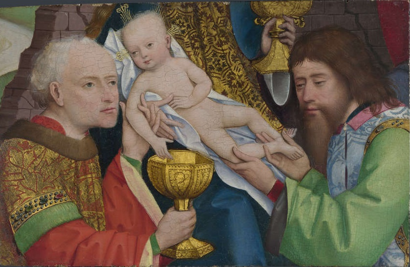 Fragment d'un panneau du retable de Liesborn